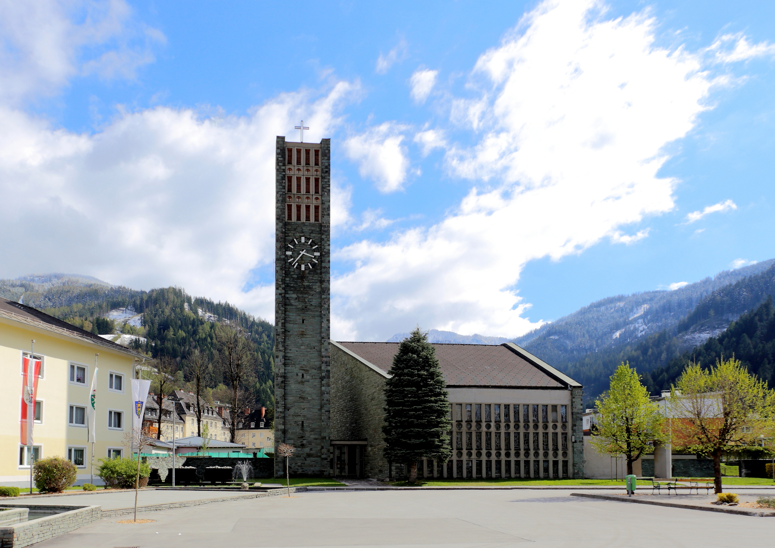 Die neue katholische Pfarrkirche hl. Andreas der steiermärkischen Stadt Trieben. Nach Plänen von Hans Beckers in den Jahren 1961 bis 1963 errichtet.